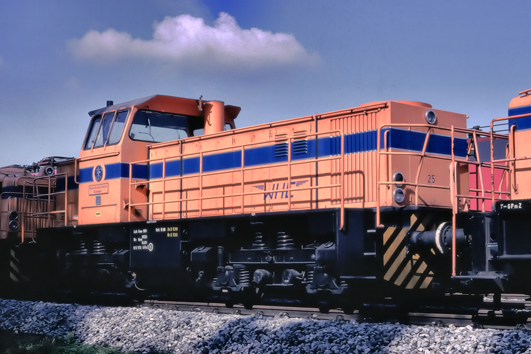 MaK G 1202 BB als Lok 25 der WHE im Herner Westhafen